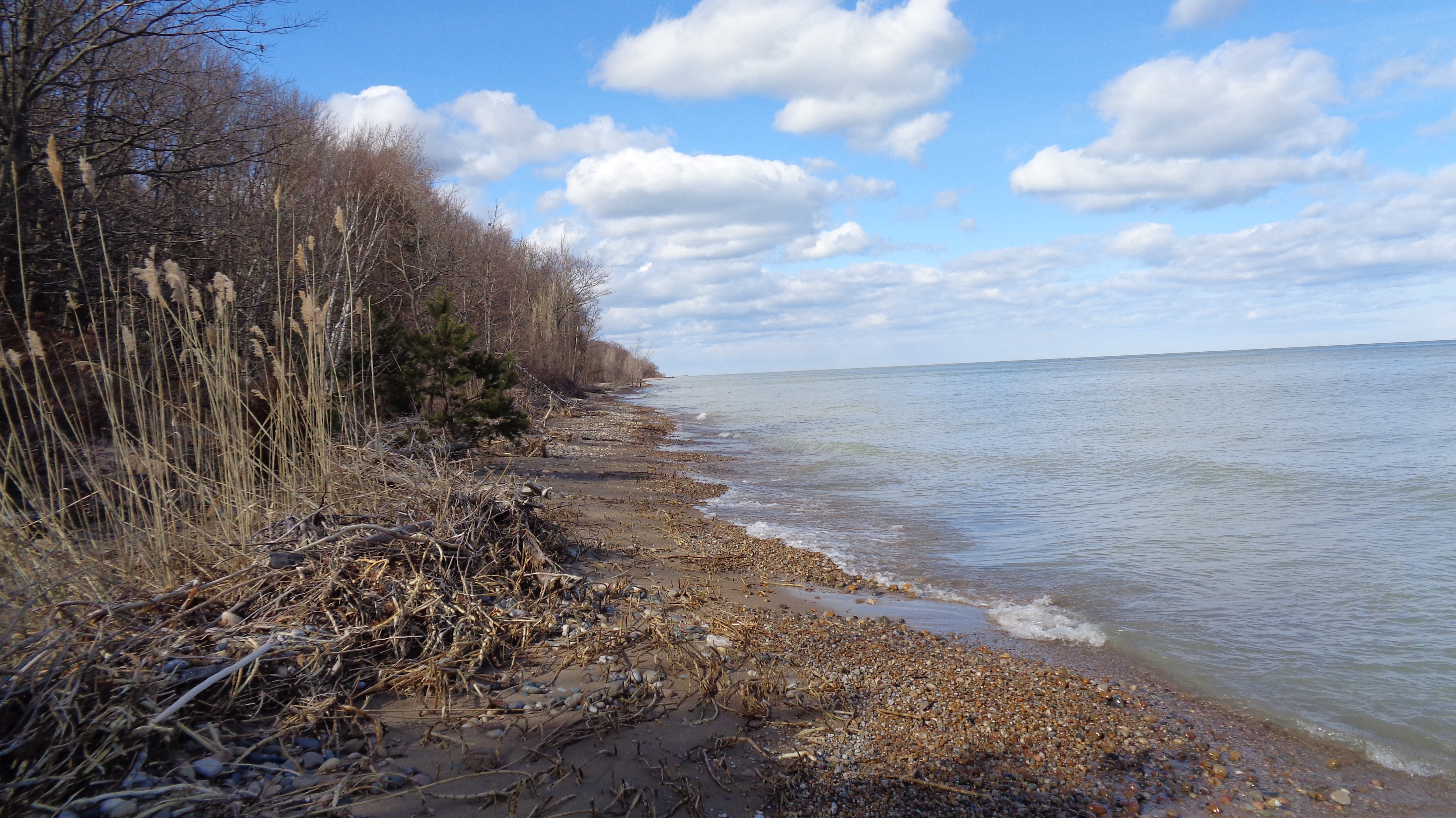 Lakeport State Park